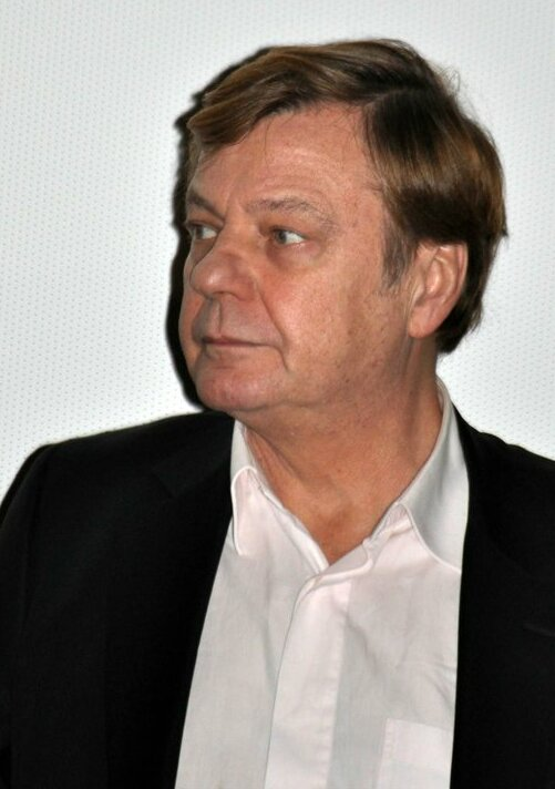 Jacques Spiesser à l'avant-première "Le Nom des gens"